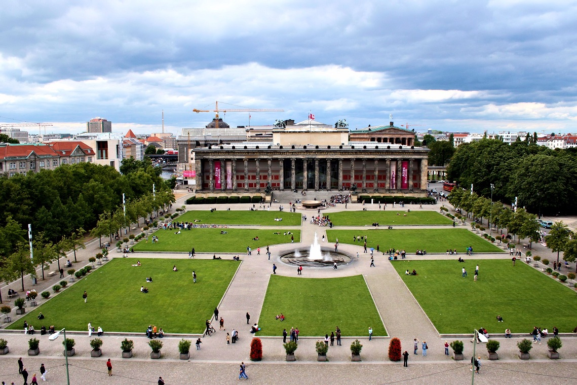 Das Alte Museum und der daran angrenzende Lustgarten, von der Aussichtsplattform der Humboldt-Box aufgenommen.This is a photograph of an architectural monument.